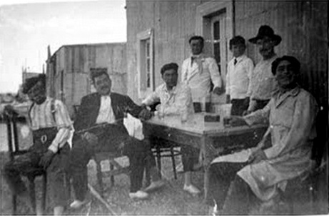 Habitantes del pueblo fuera de sus casas de chapa